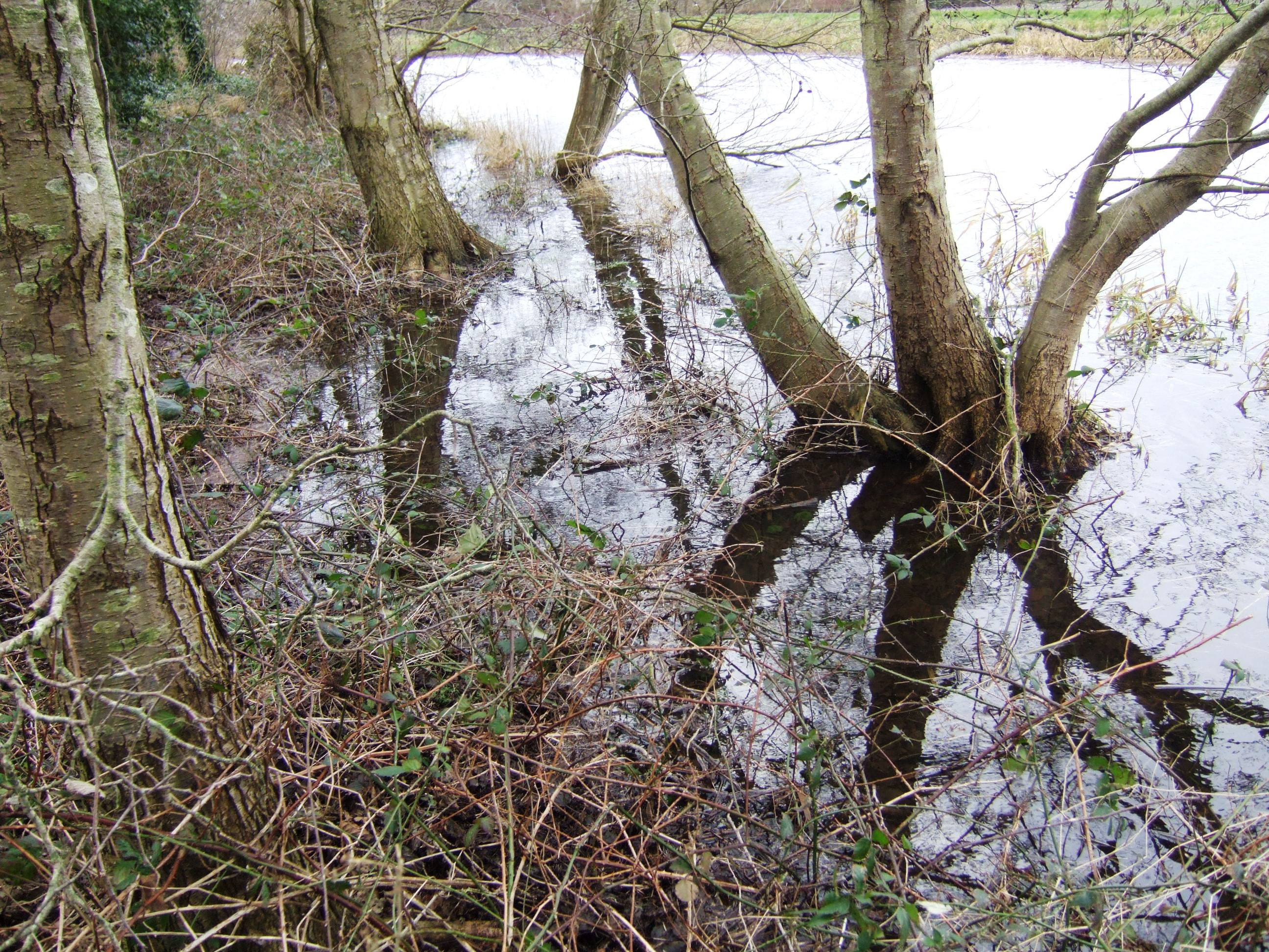 Verhoogd boezemwaterpeil in de Jonkersloot (gemeente Skarsterlân) als gevolg van een noordwesterstorm.